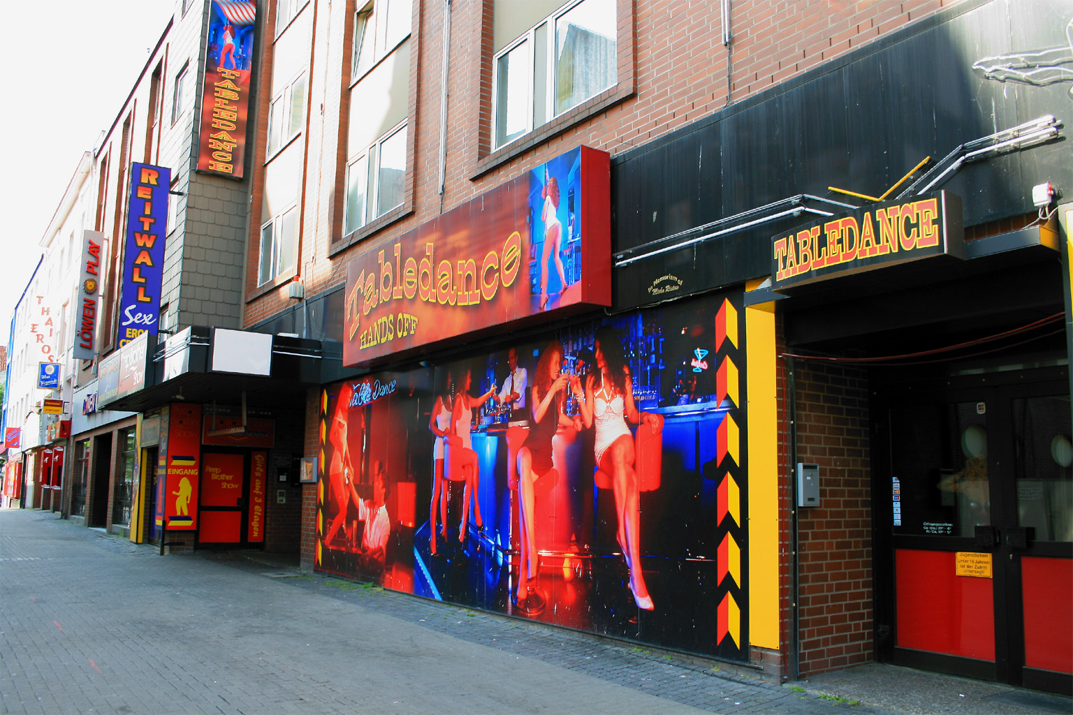 Im Rotlichtviertel am Steintor in Hannover (Niedersachsen, Deutschland); hier in der Scholvinstraße ("morgens").